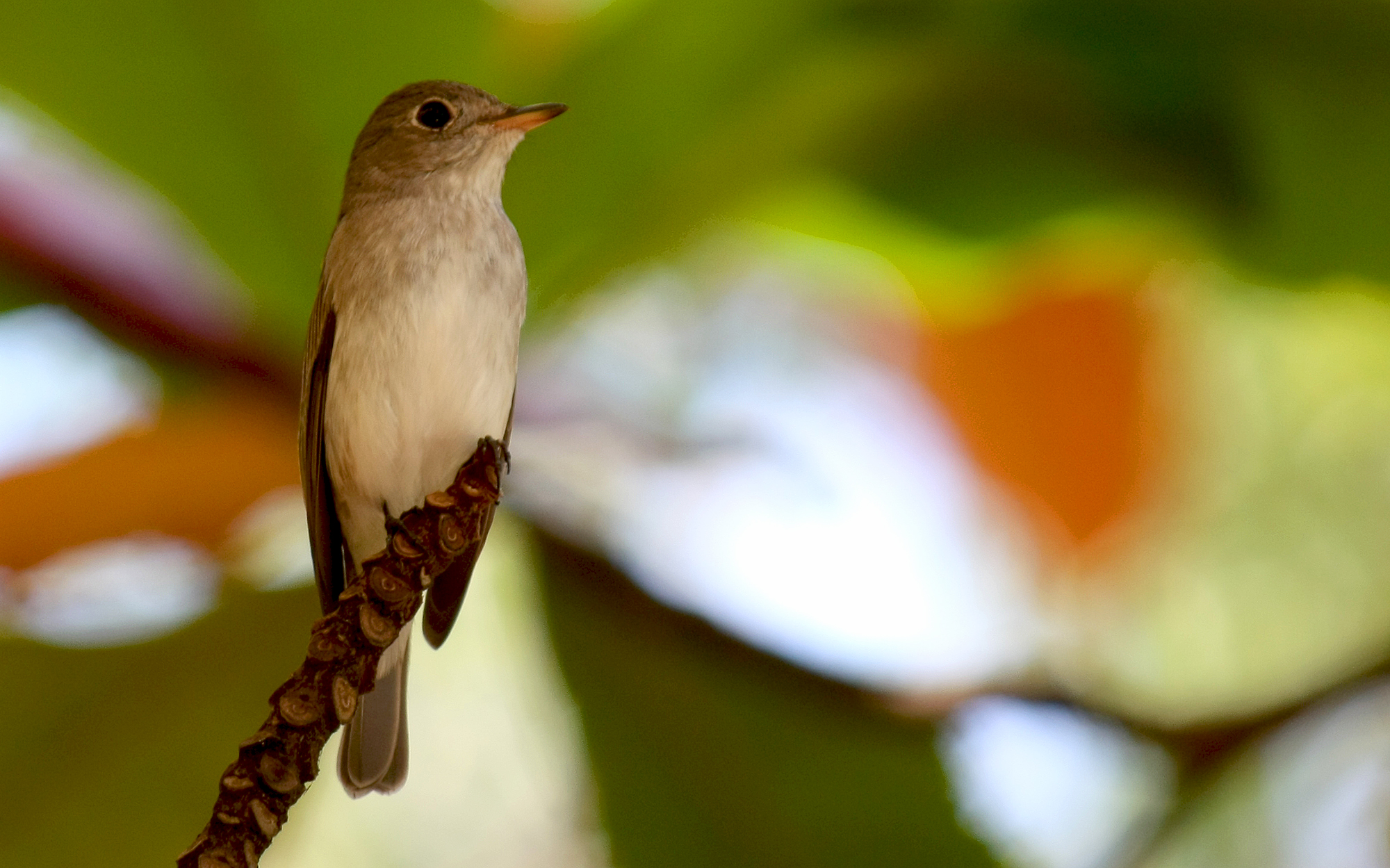 பழுப்பு ஈ பிடிப்பான் - தமிழ்நாட்டில்ஃ இலங்கையில் காணப்படும் பறவைகள்